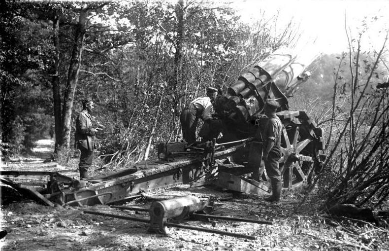 I. Weltkrieg 1914-1918 Argonnen; Richten einer 21 cm Haubitze; Juli 1915